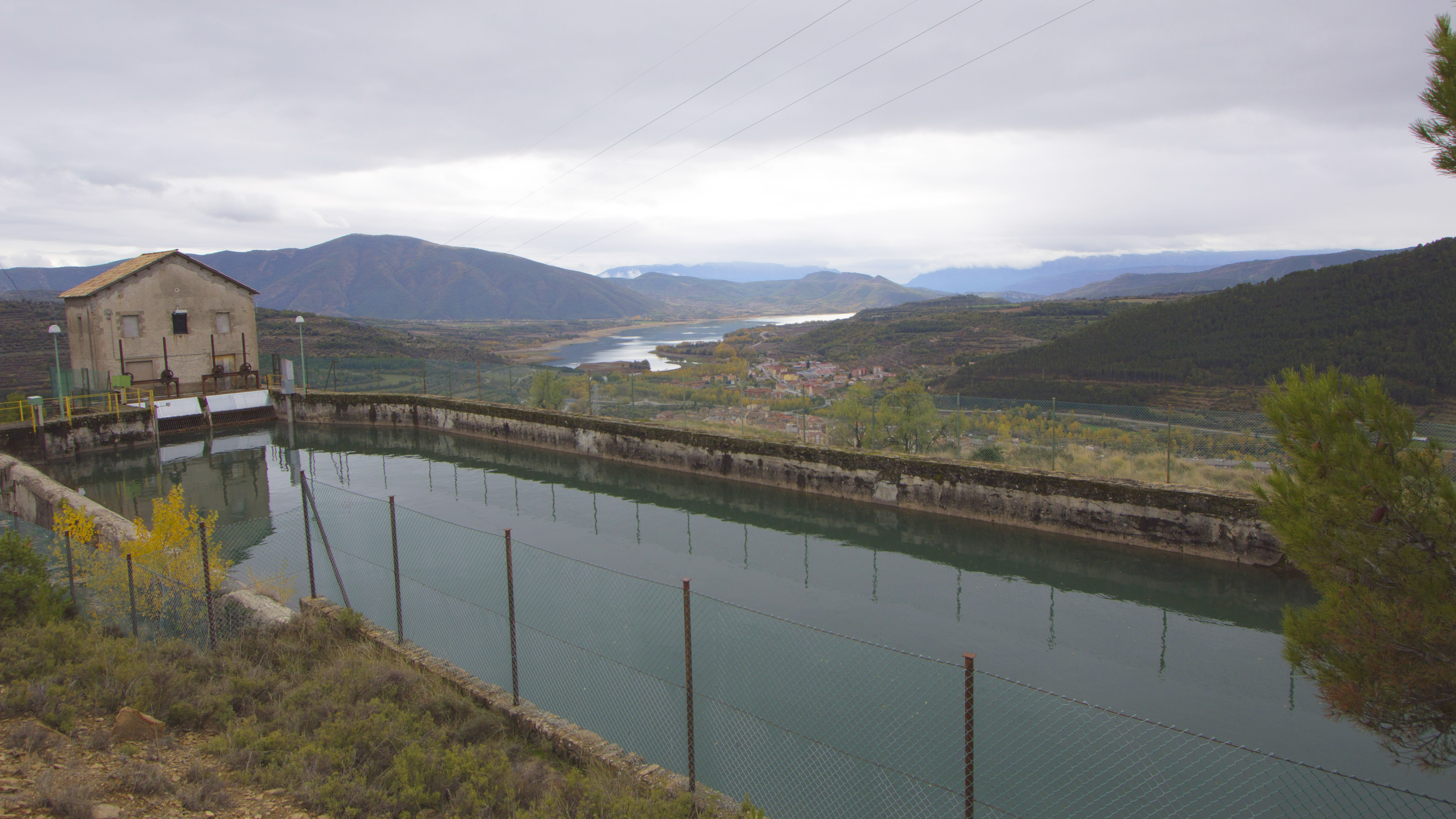 Vista des de Vileres: Dipòsit salt CH Pobla de Segur,vila de Pobla de Segur i Embassament de Sant Antoni (Pallars Jussà)